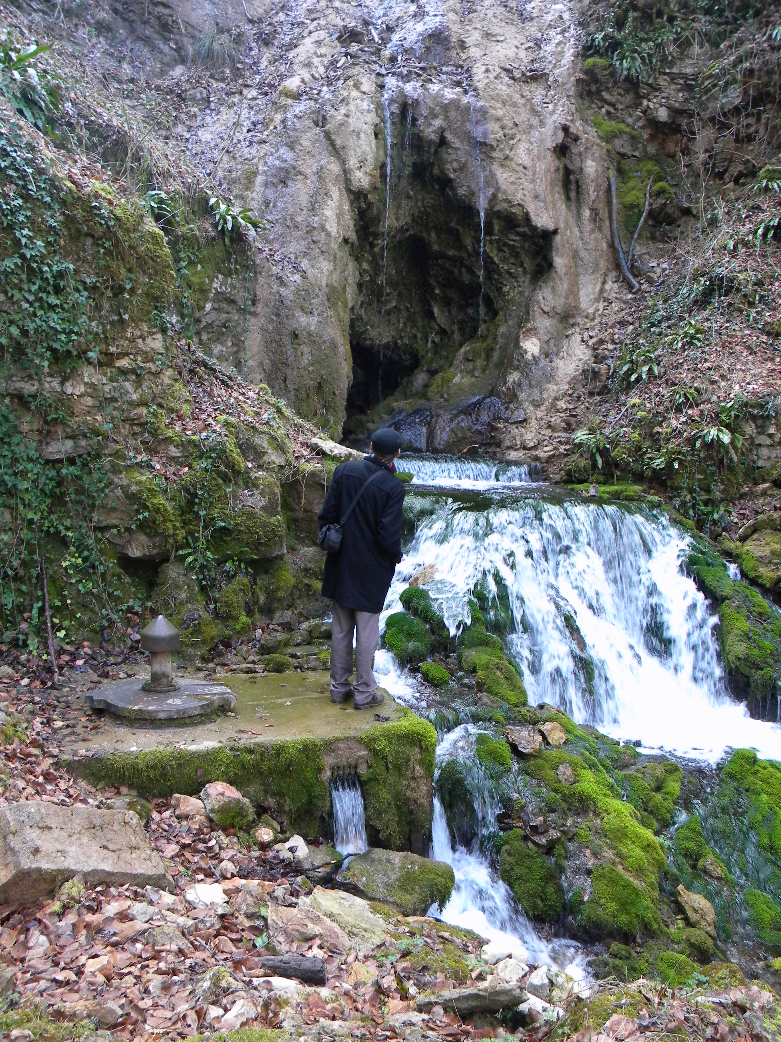 Groto Antheuil